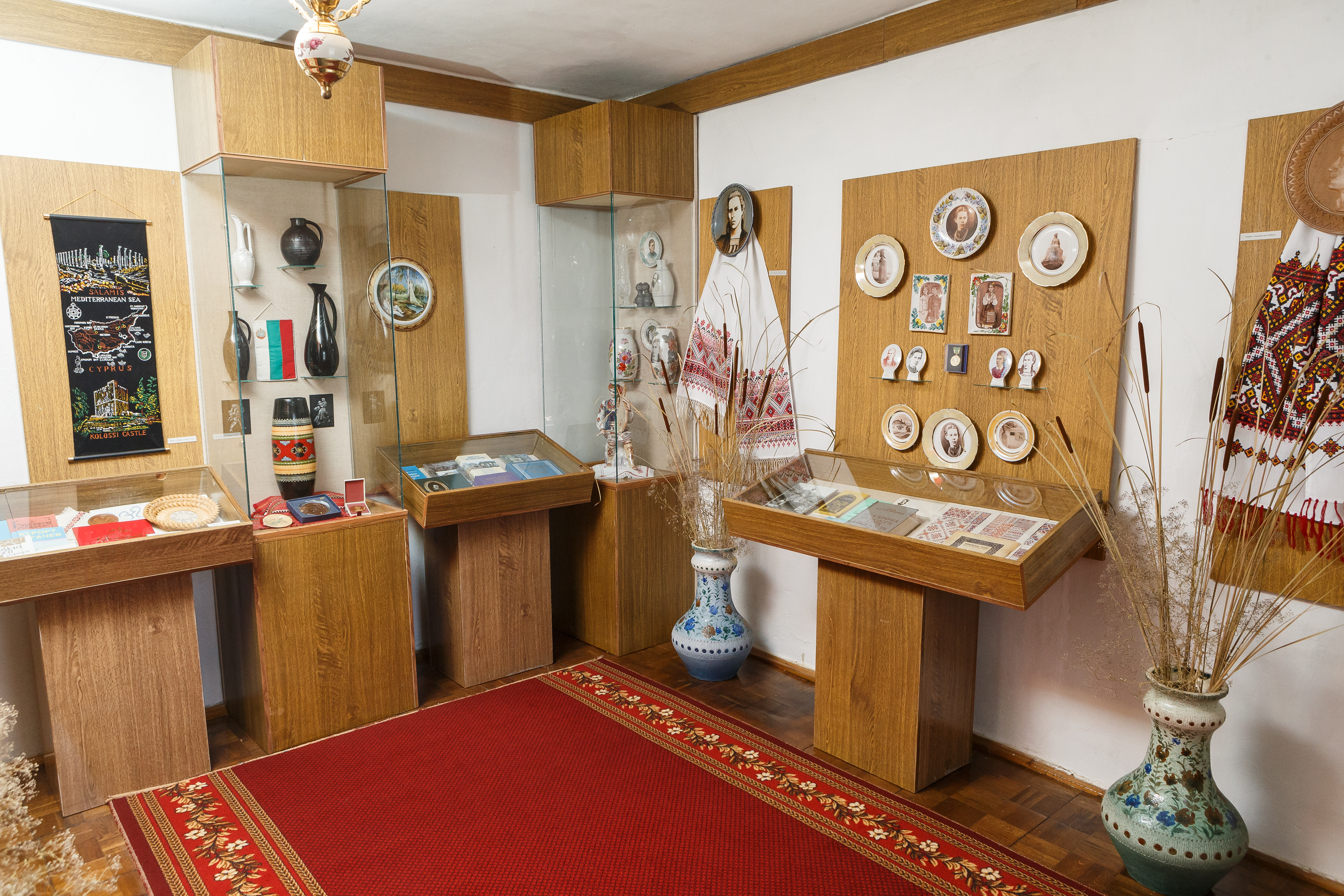 Відділ вшанування пам'яті Лесі Українки. Музей поетеси у Новограді-Волинському. Фотограф Юрій Зубрицький.